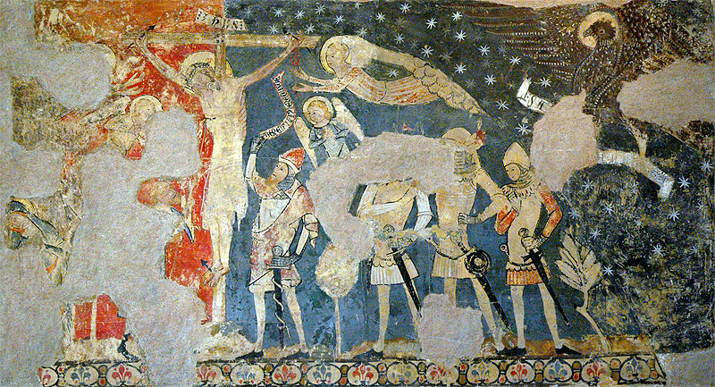 Crucifixió. Pintura mural procedent de l’església de Sant Miquel de Cardona. Segle XIV. Museu Diocesà i Comarcal de Solsona, Solsonès (Catalunya, Espanya)